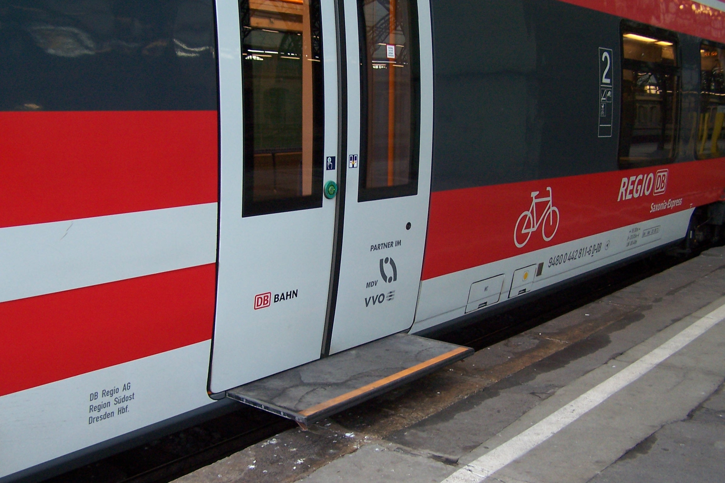 Schiebetritt des Talent 2 442 811 in Dresden Hbf.